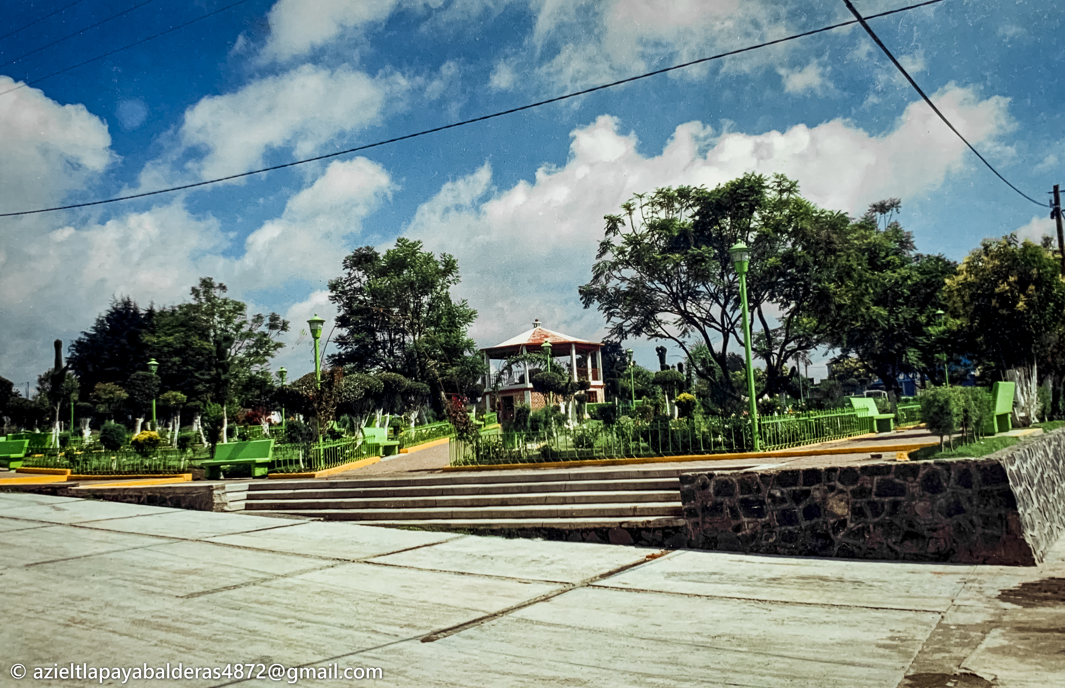 Parque Municipal de Domingo Arenas, Pue. Tomada desde el cuadrante sureste, Año 2010.